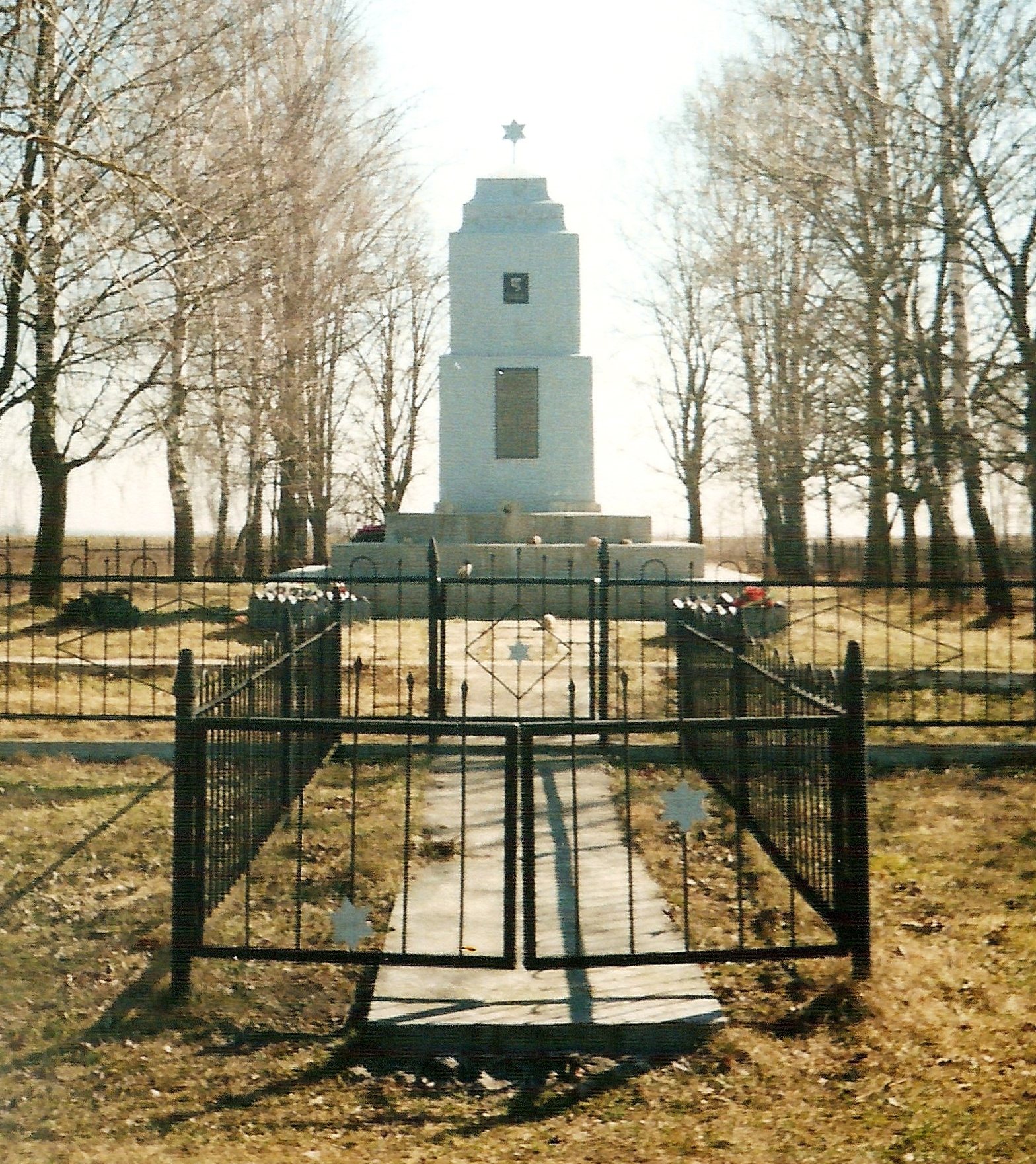 Памятник на братской могиле евреев - жертв Холокоста в посёлке Желудок Щучинского района Гродненской области. Установлен в 1959 году.